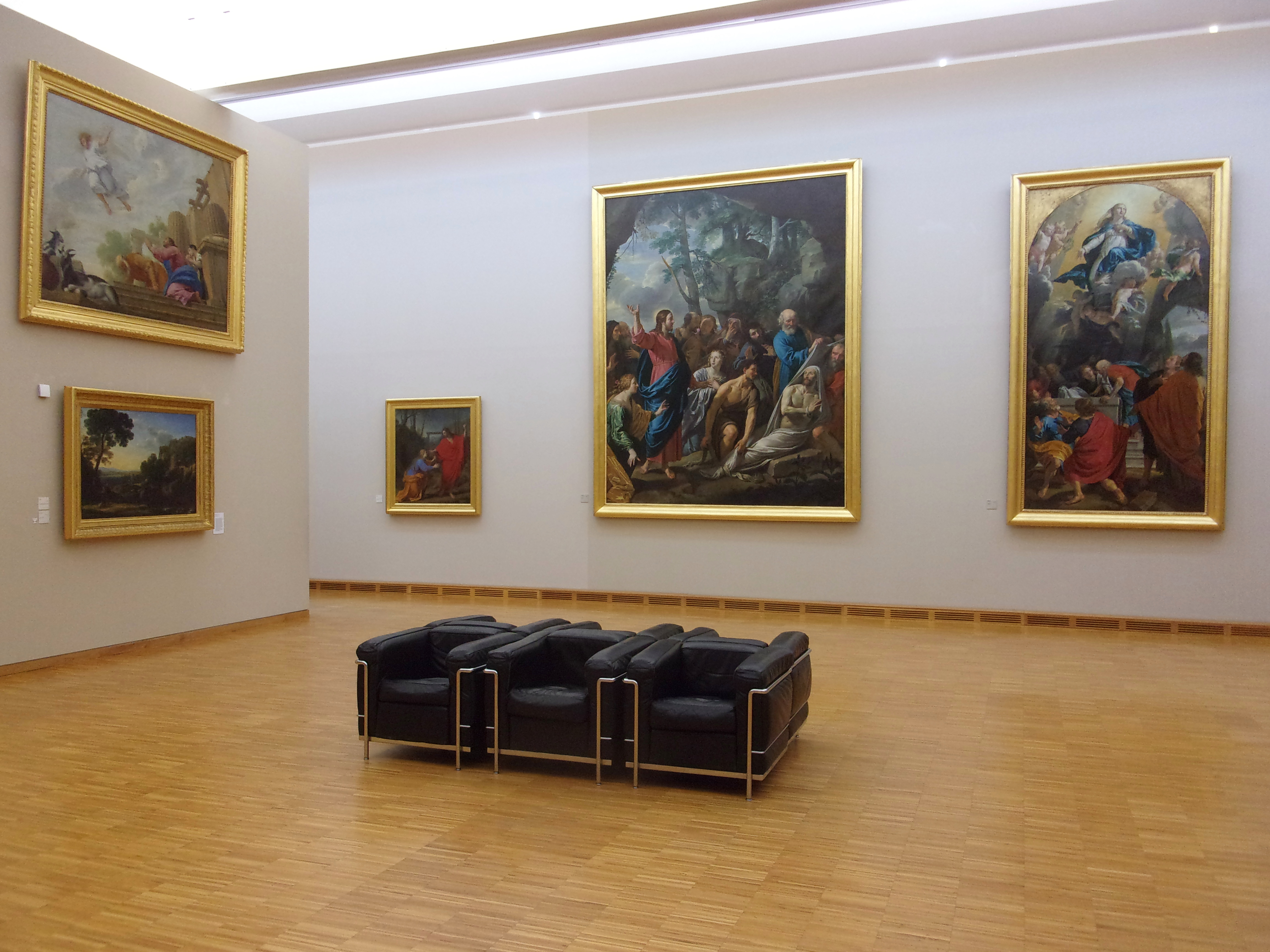 Salle N°8 du XVIIe siècle ; Musée de Grenoble